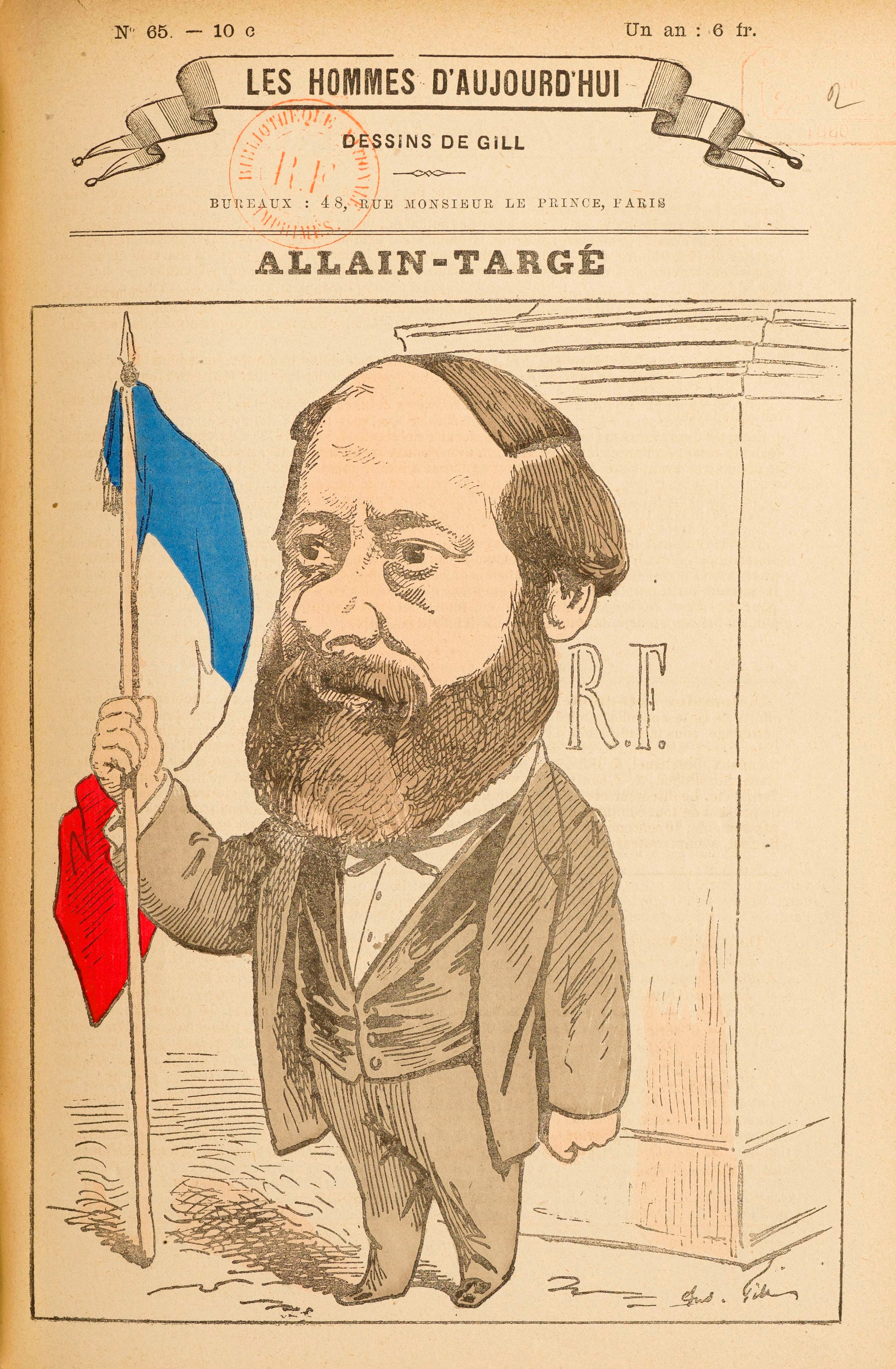 François Allain-Targé (1832-1902), caricature par André Gill, Les Hommes d'aujourd'hui, n°65, 1880